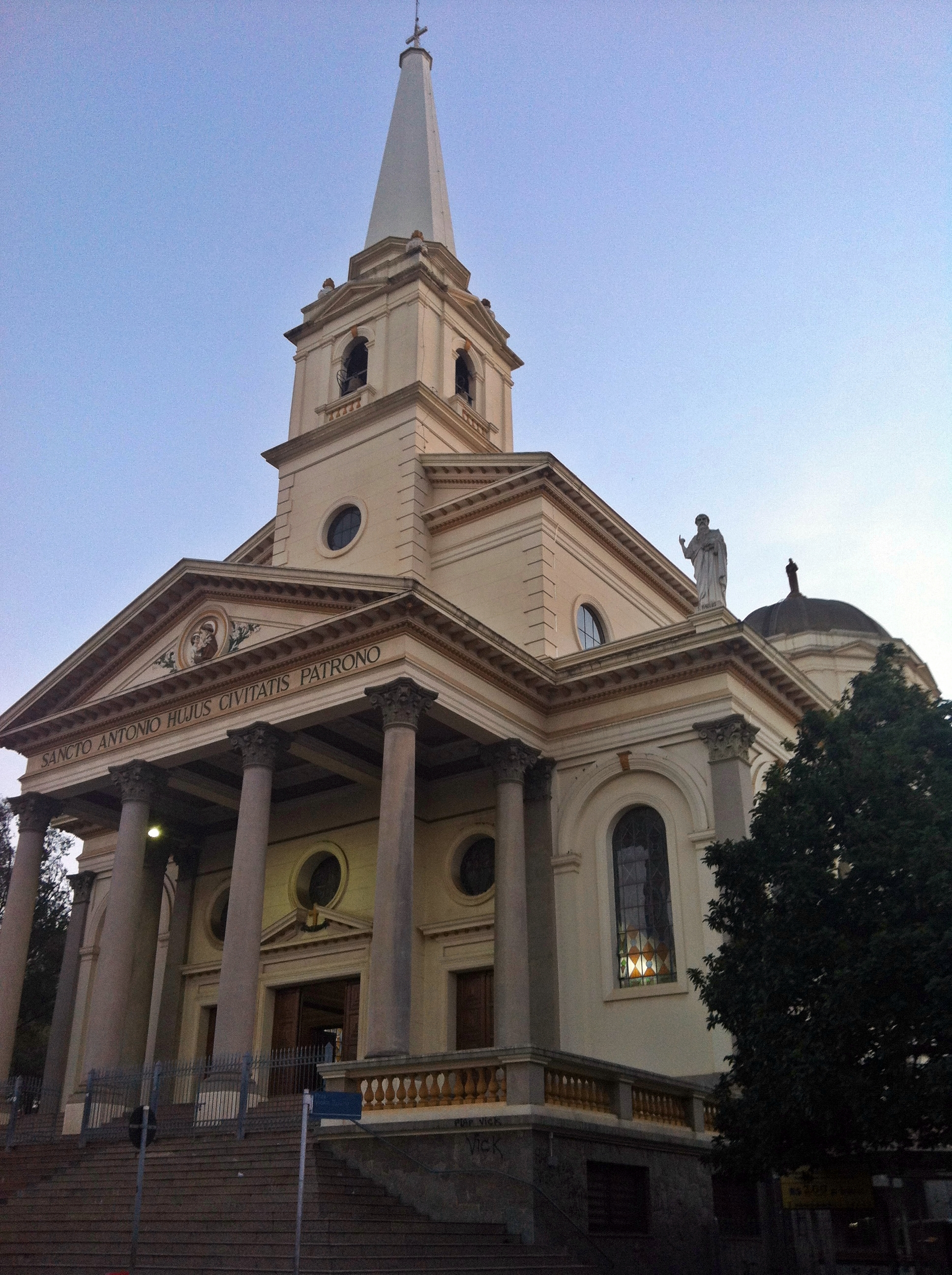 Matriz de Santo Antônio em Americana, São Paulo, Brasil.